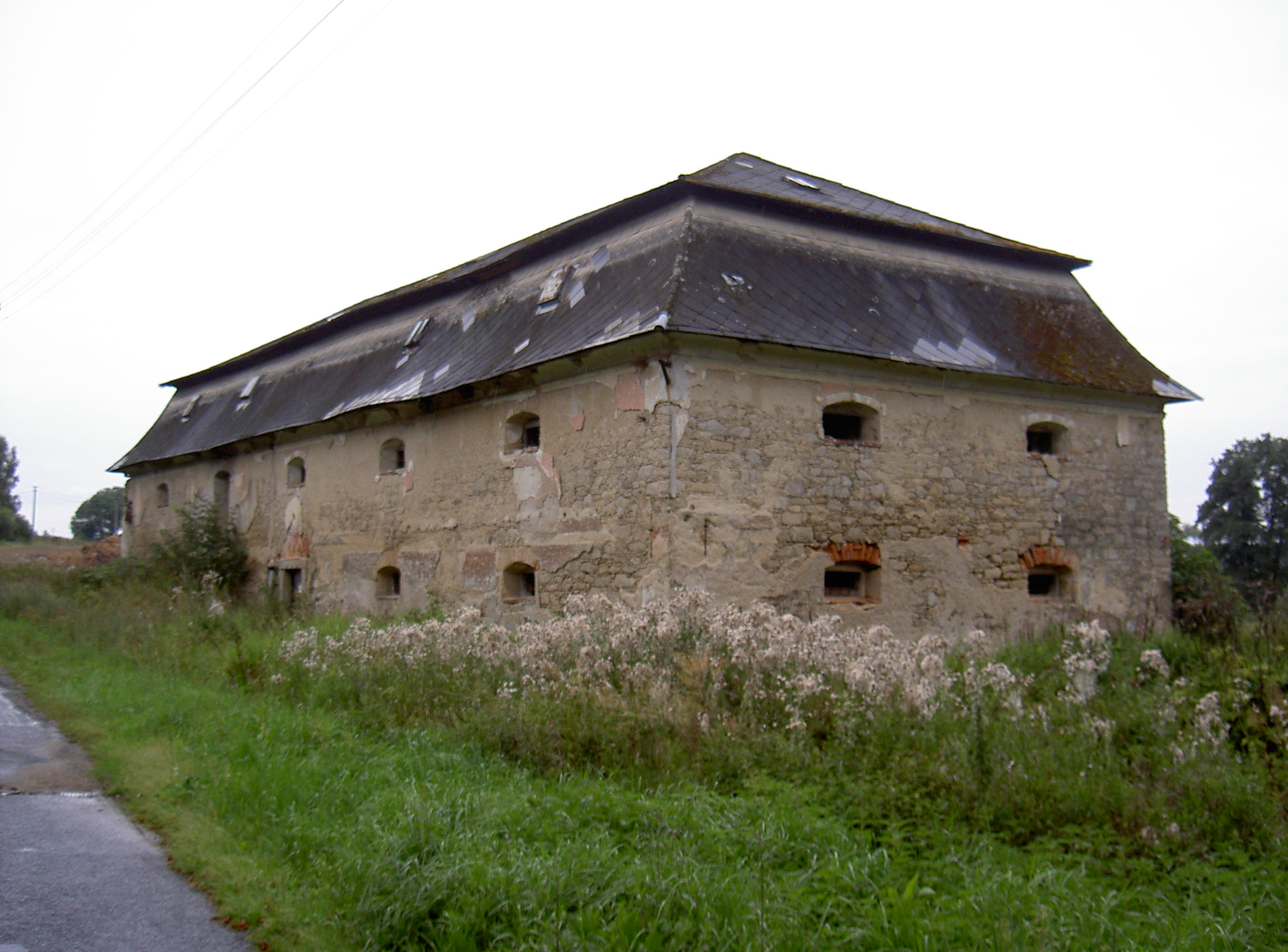 Svatá Kateřina Getreidespeicher